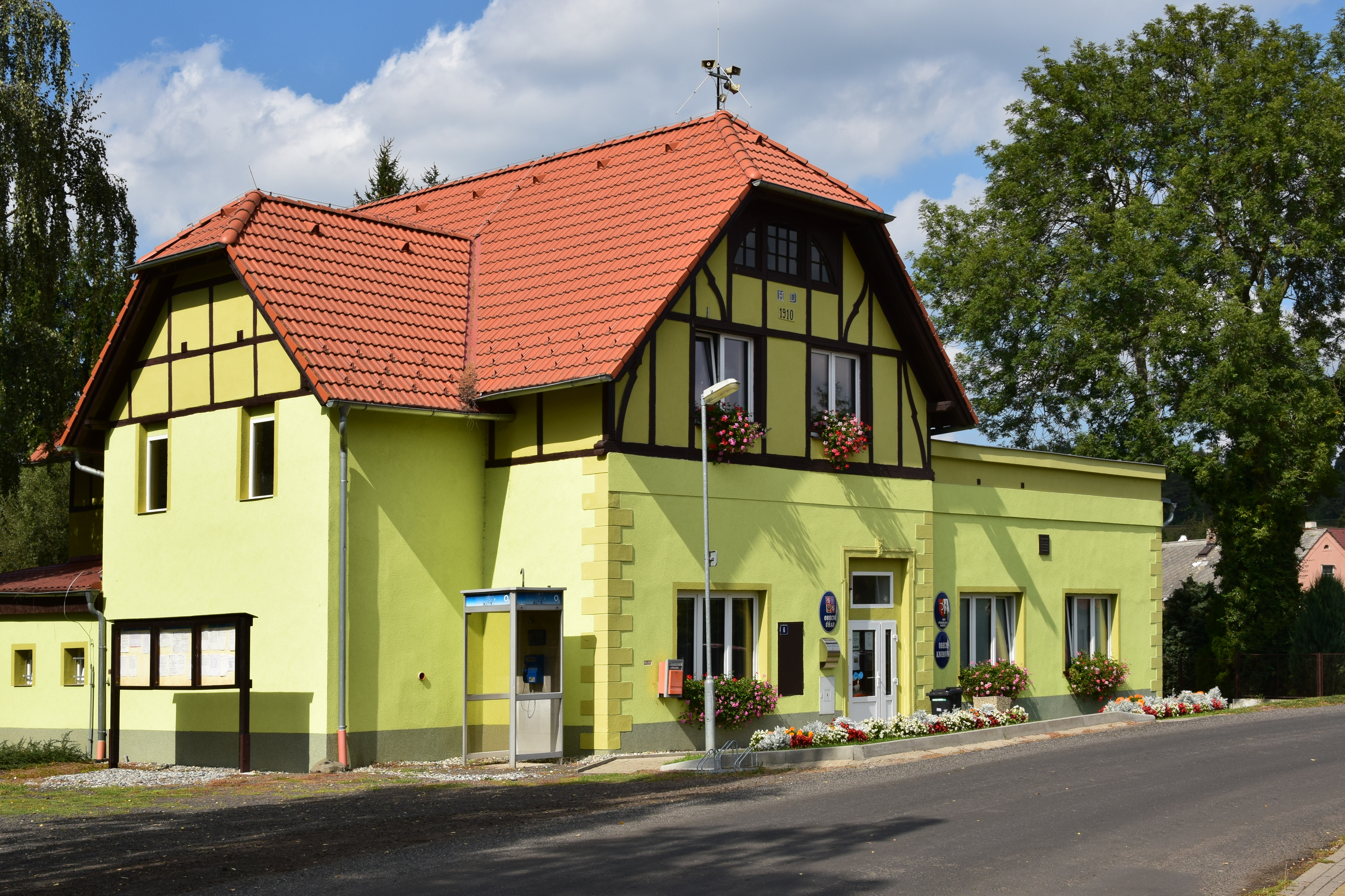 Podbořanský Rohozec – obecní úřad